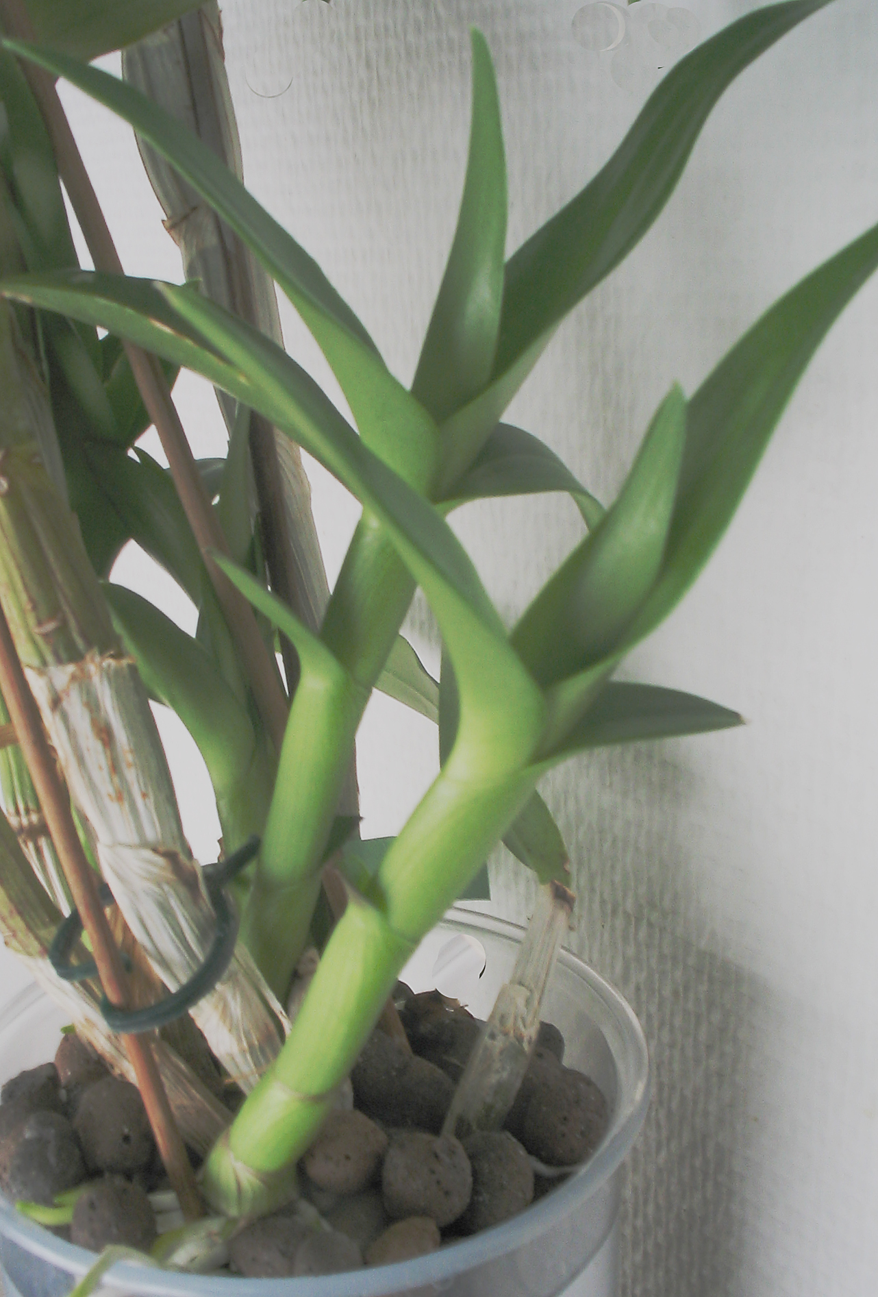 Orchid semi-hydro Bilden tagen av Josef Makower - mig själv och får förfogas fritt. Foto:--JoJo 8 januari 2006 kl.04.49 (CET)